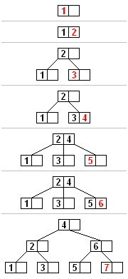 A B tree data structure example (Exemplo da estrutura de dados árvore B). This B tree is of order 3.